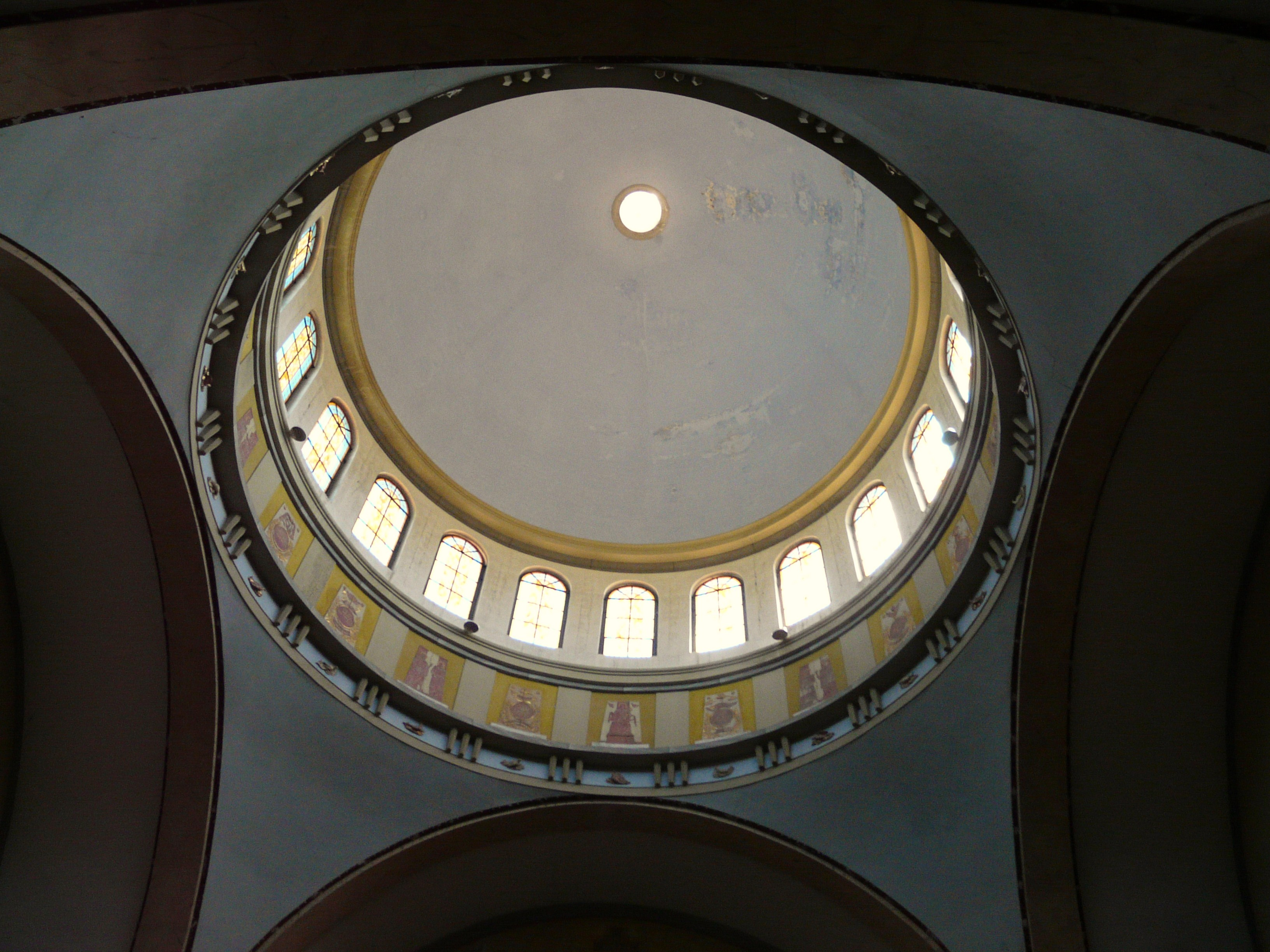 Immagini varie del santuario della Madonna di San Marco, Bedonia, Emilia Romagna, Italia